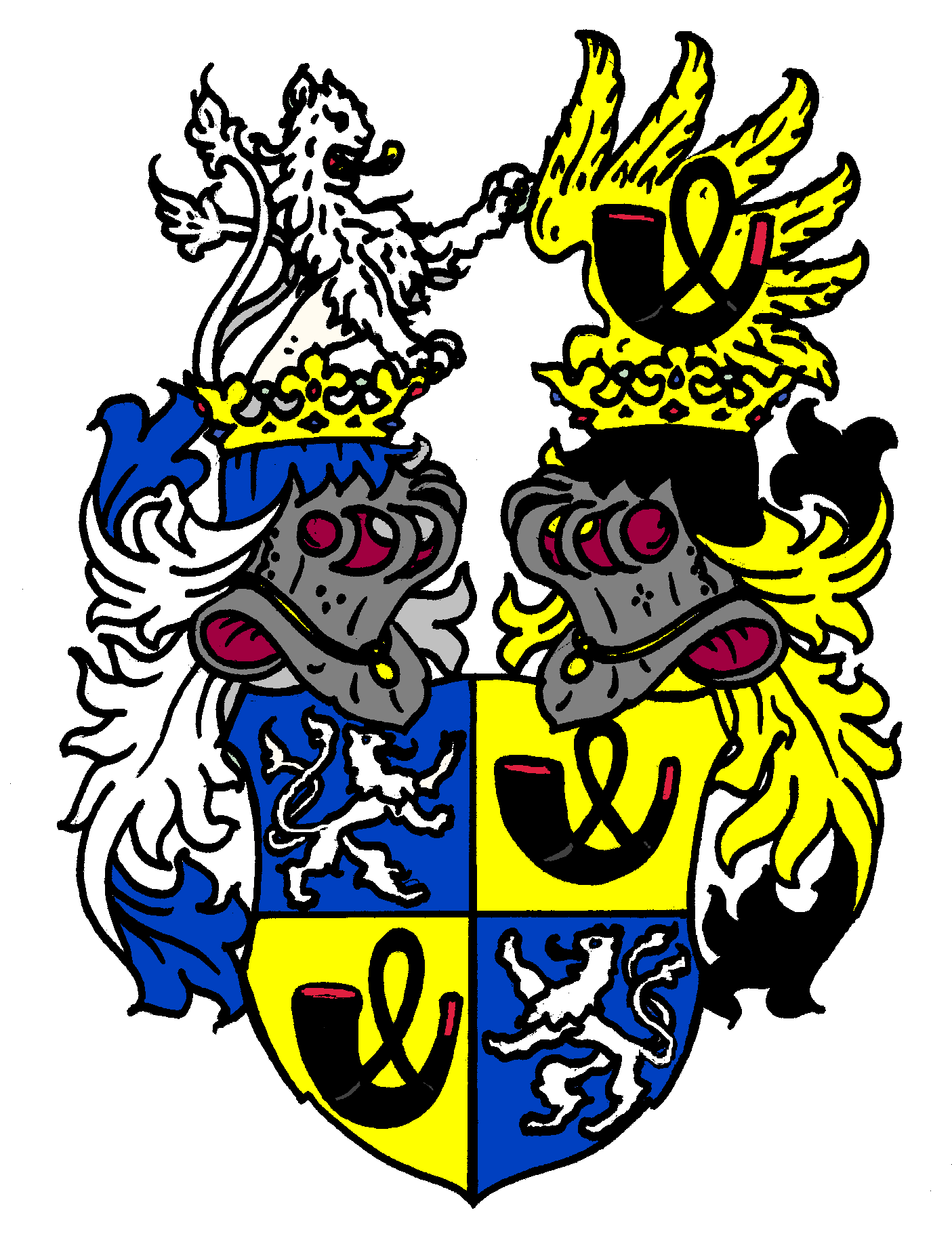 Freiherrenwappen der von Kaskel; österr. Adelsstand 1867; Freiherrestand 1869